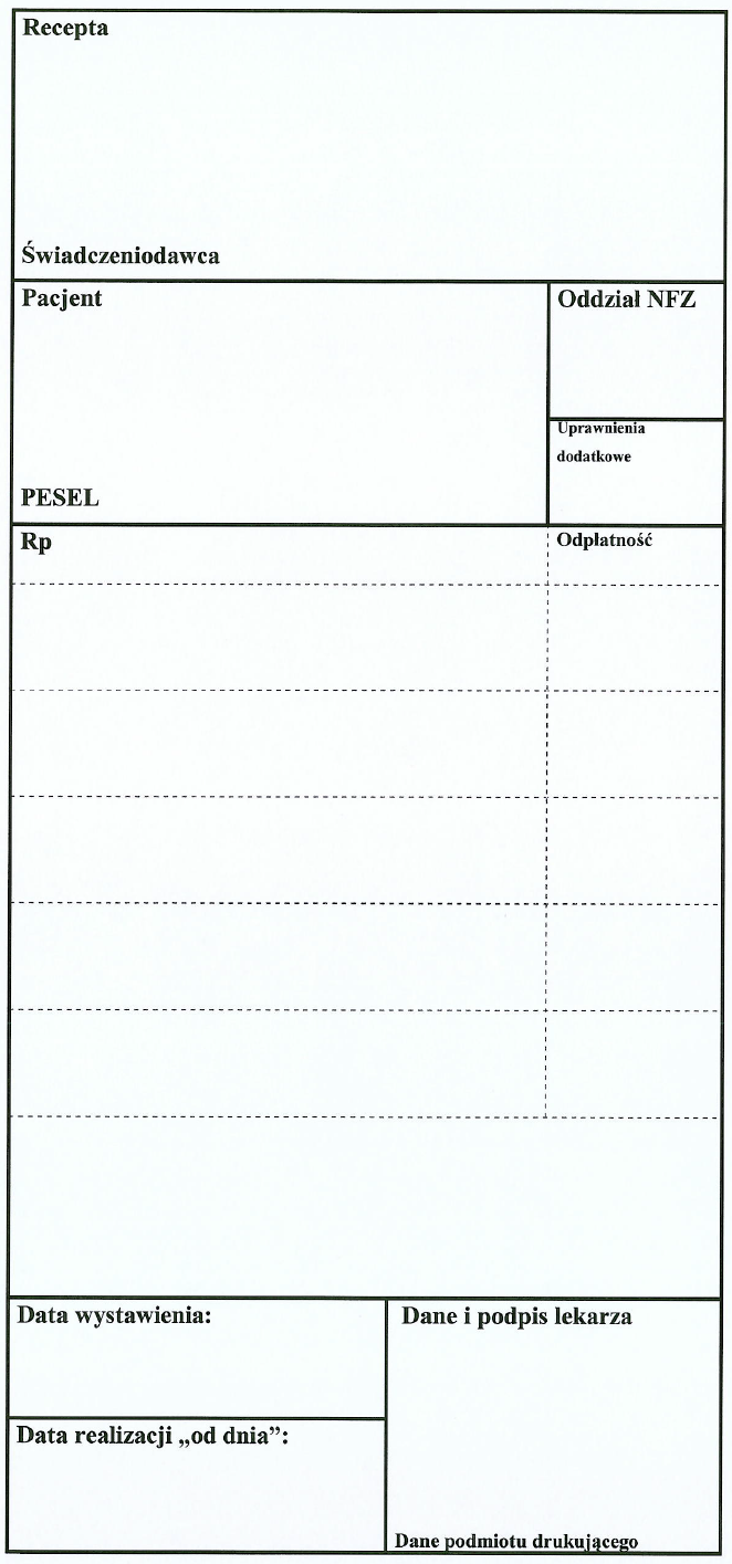 Wzór ustawowy recpety lekarskiej z 2012 r.